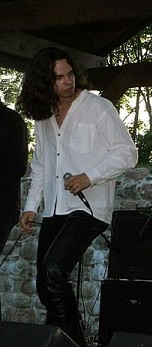 Jeronimas Milius. Lithuanian musician